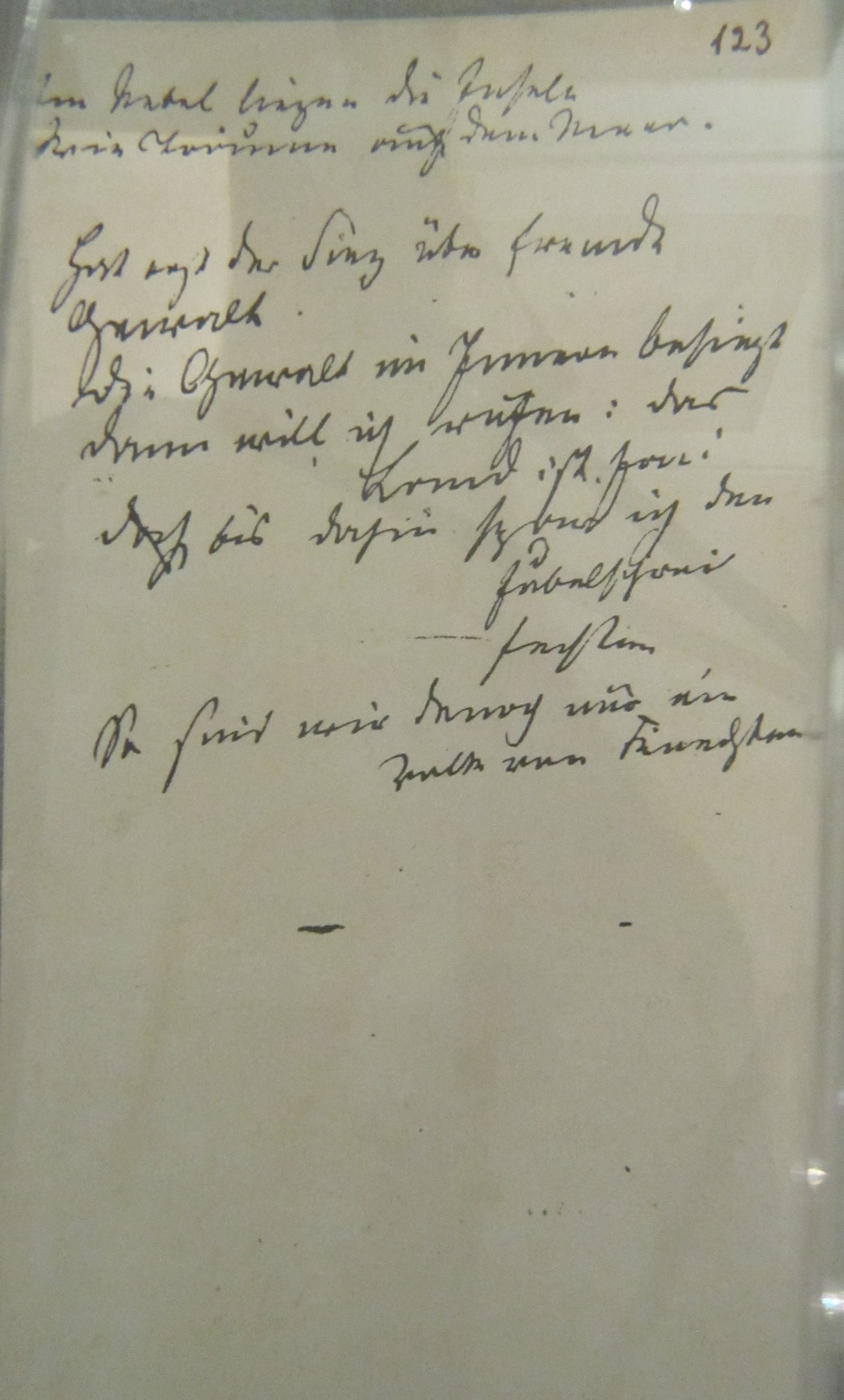 Hat erst der Sieg über fremde Gewalt/ Die Gewalt im Innern besiegt/ Dann will ich rufen: Das Land ist frei!/ Bis dahin spar ich den Jubelschrei. Theodor Storm, Verse zum Krieg 1870/71, Eintrag in die Sammelhandschrift „Meine Gedichte“. ausgestellt im Theodor-Storm-Haus in Husum